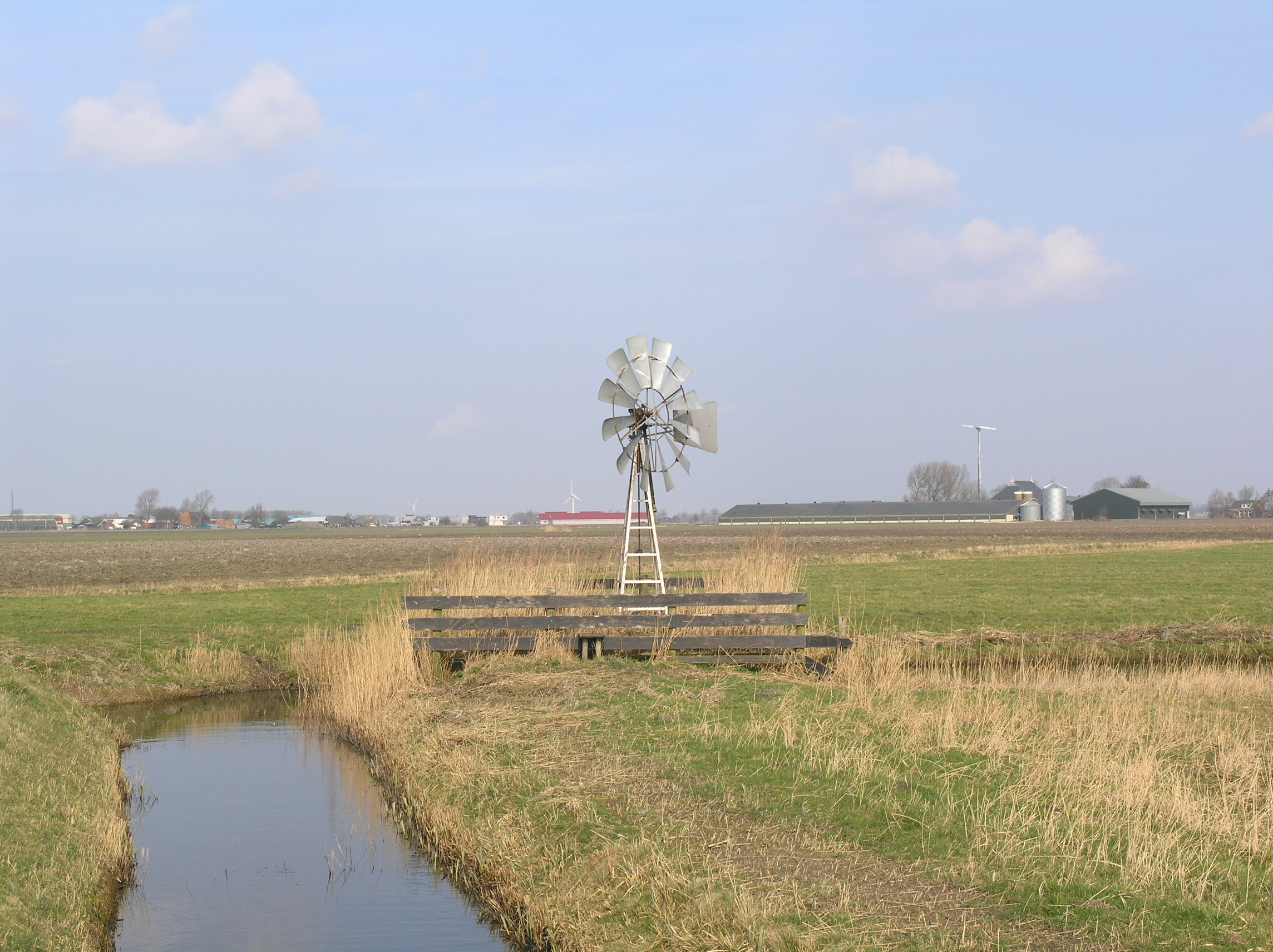 Ferwerd Windmotor